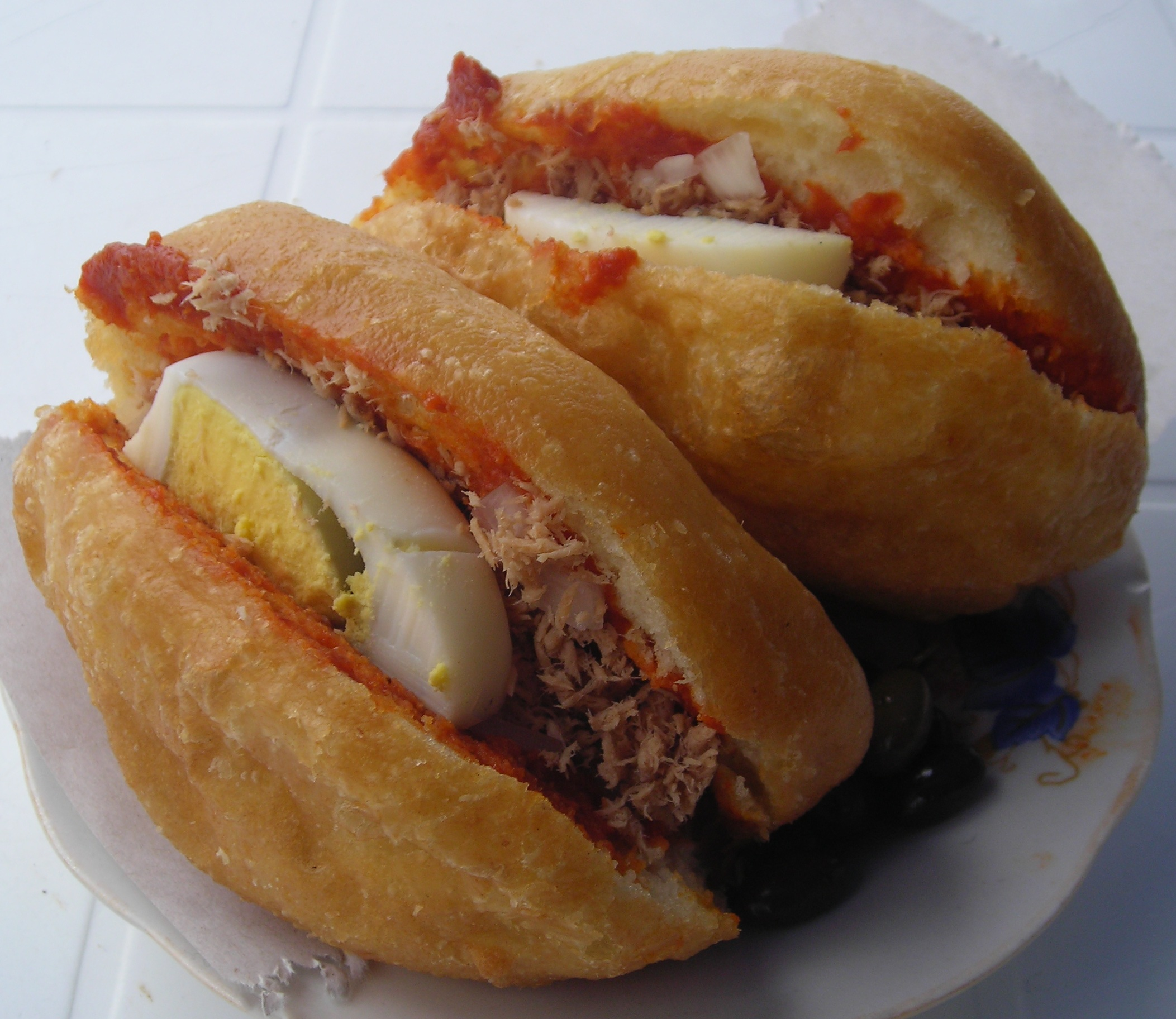 Le fricassé ou frit cassé est un beignet salé issu de la tradition culinaire tunisienne.